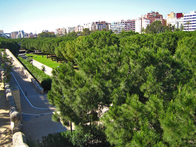 Jardí del Túria, a València. Vista des de l'Albereda, amb el Palau de la Música al fons a l'esquerra.